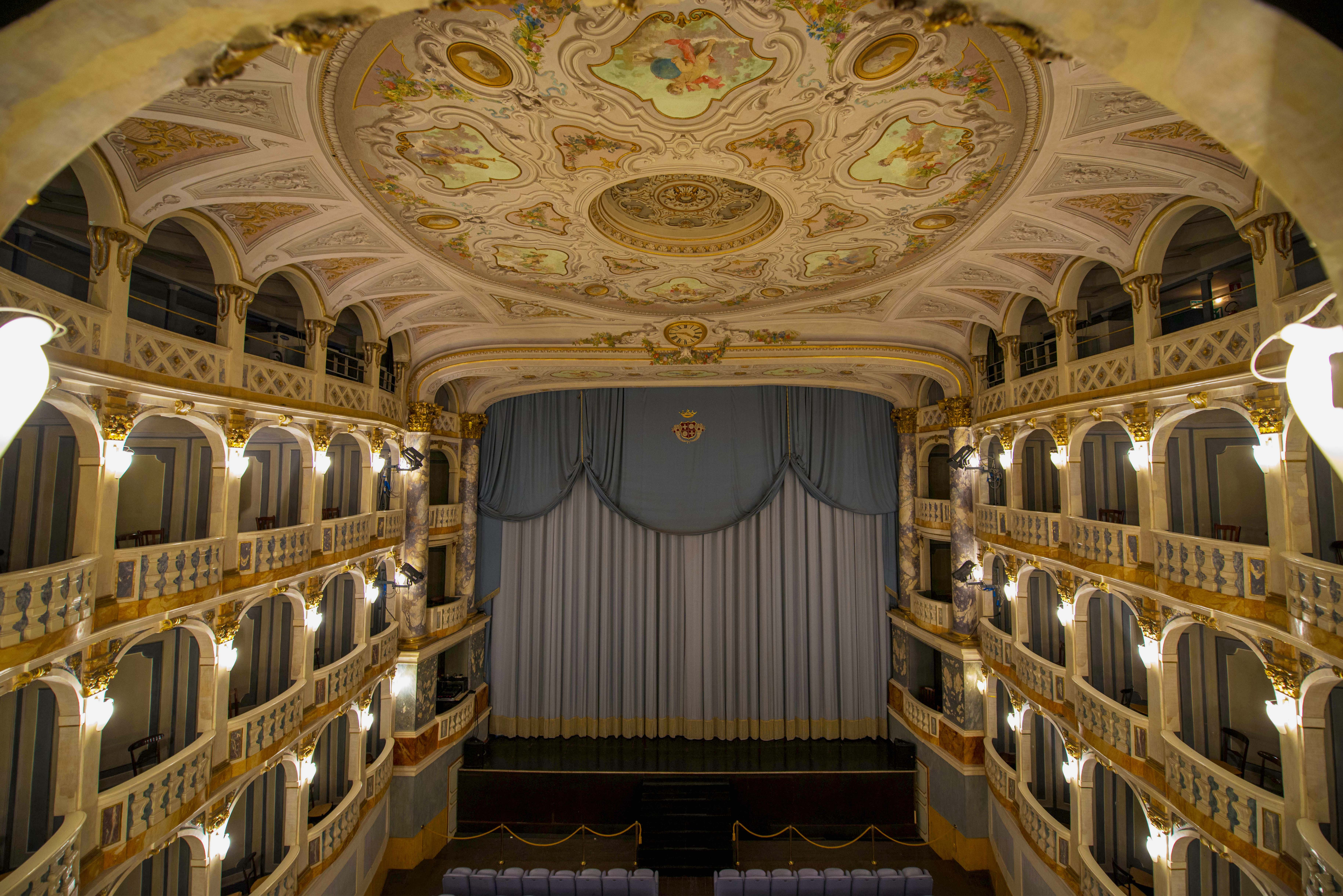 Teatro Lauro Rossi This is a photo of a monument which is part of cultural heritage of Italy.